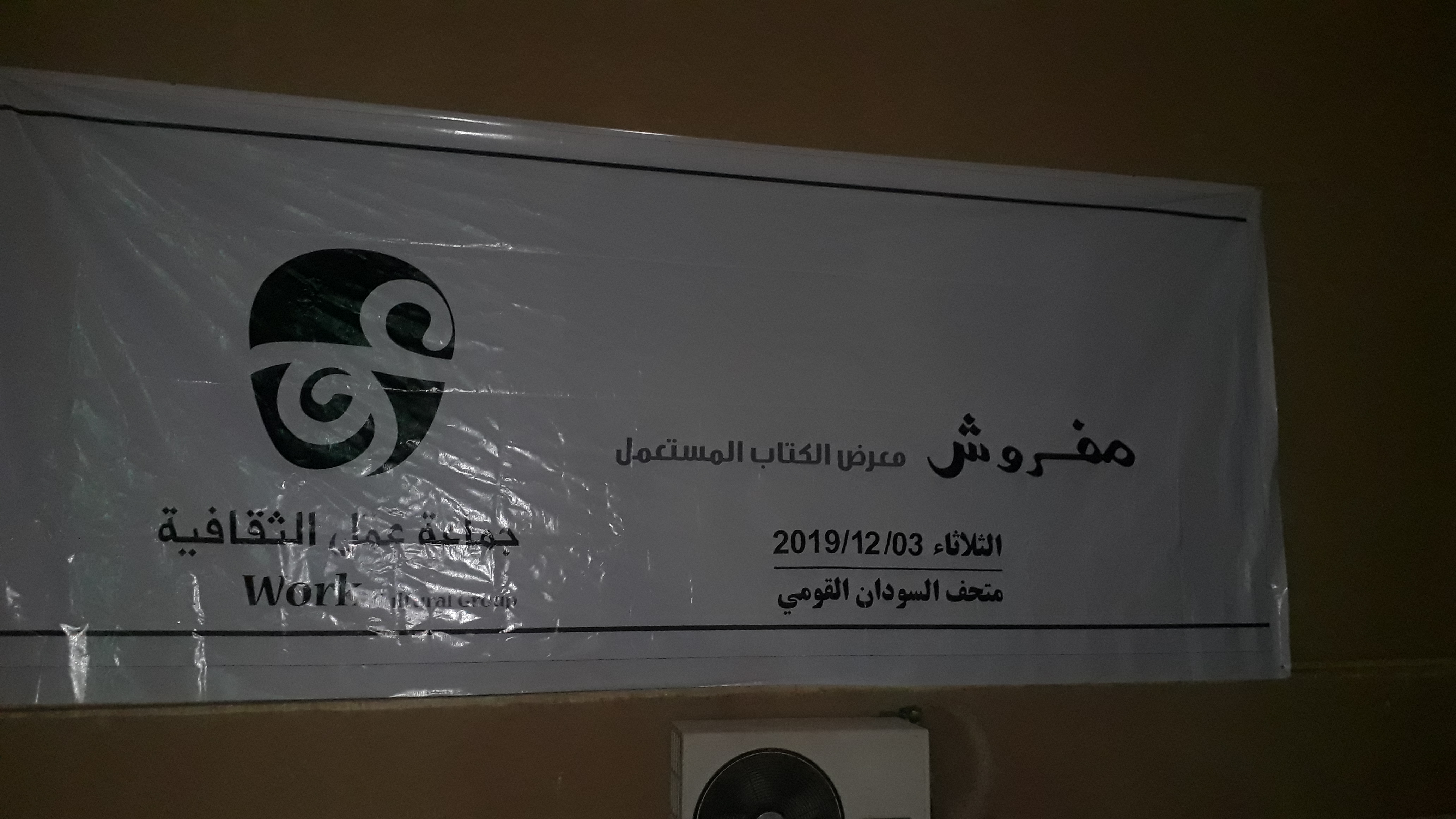 معرض مفروش لهشر ديسمبر 2019